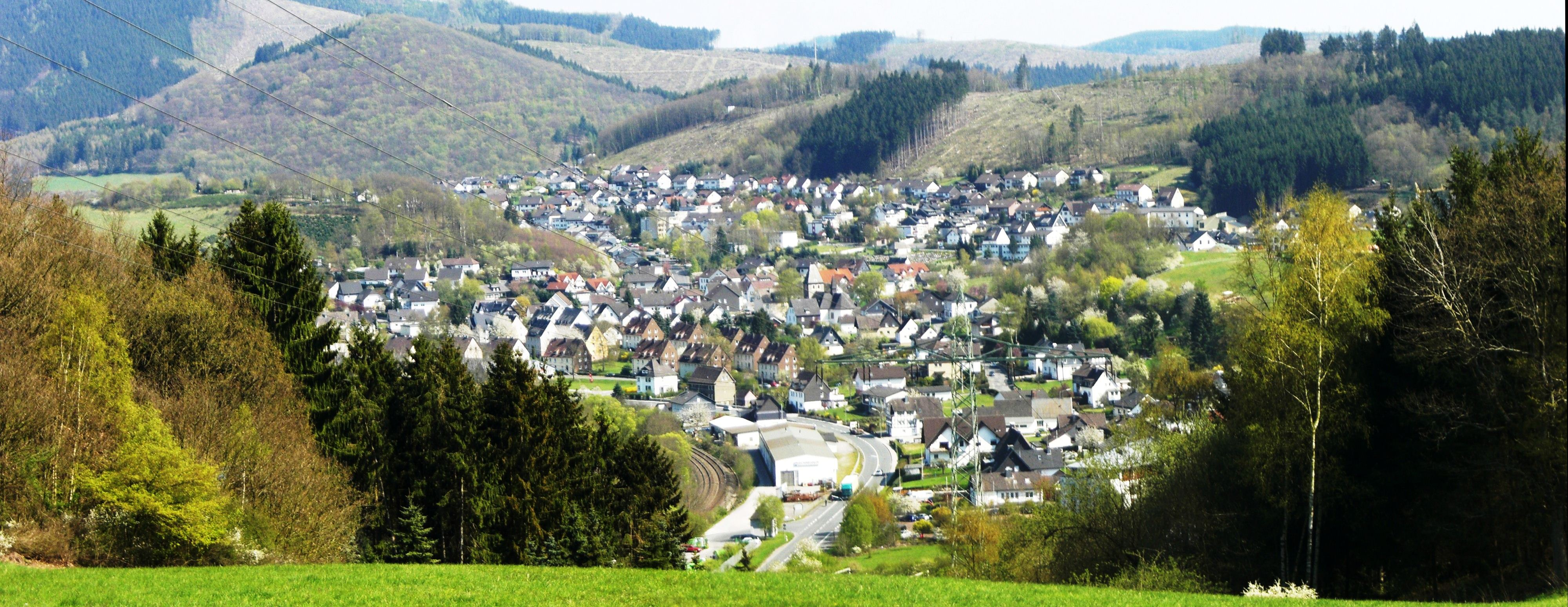 Panoramablick auf Maumke vom Kreuzberg (Gemarkung Bonzel)aus gesehen